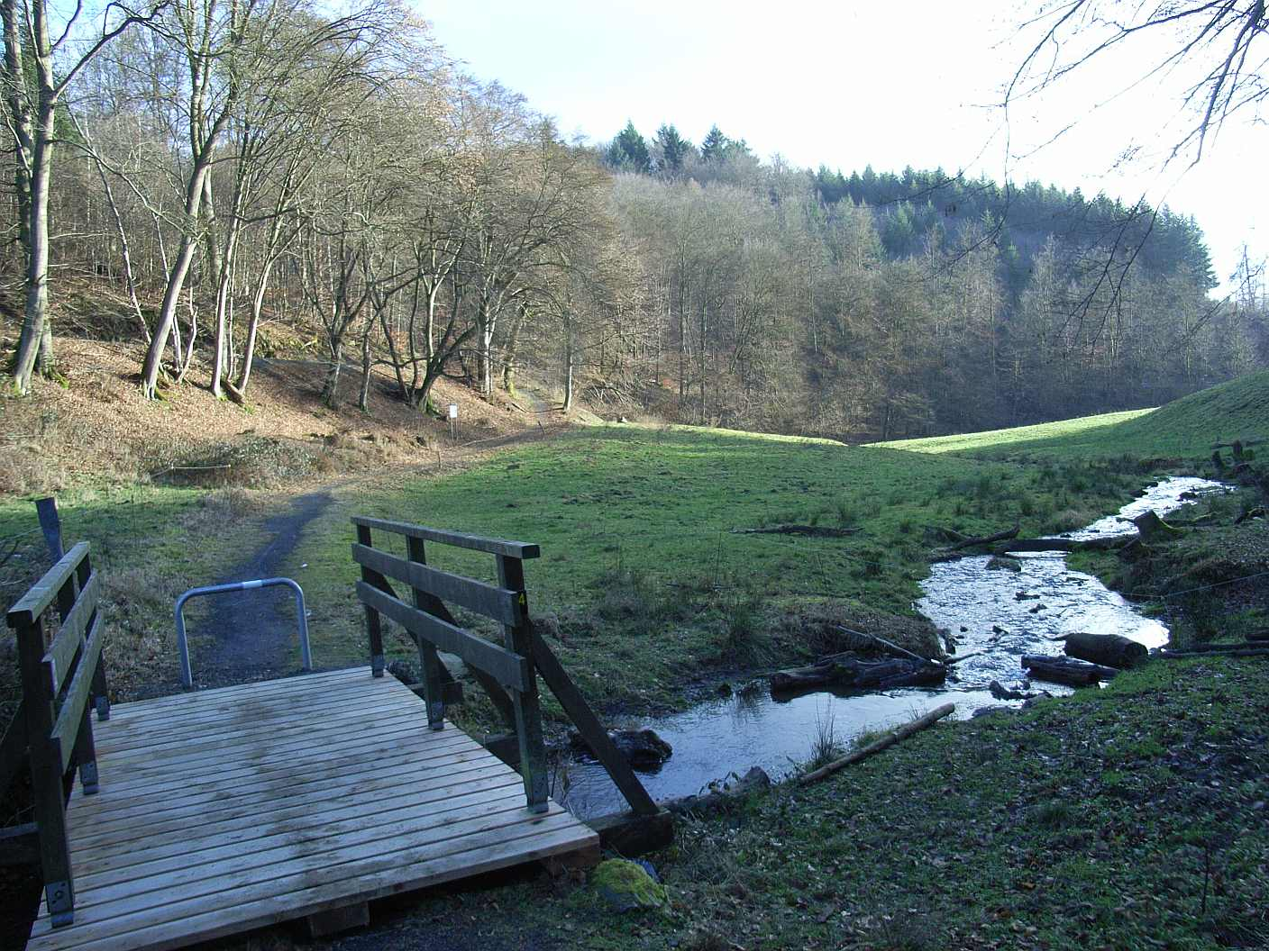 Laubach am Laubachswinkel zwischen Ehlscheid und Rengsdorf